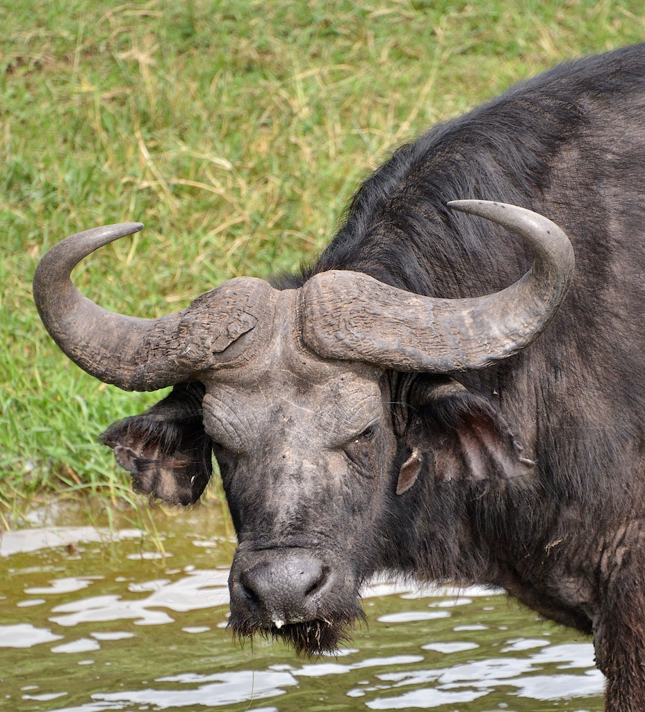 Water Buffalo, Uganda